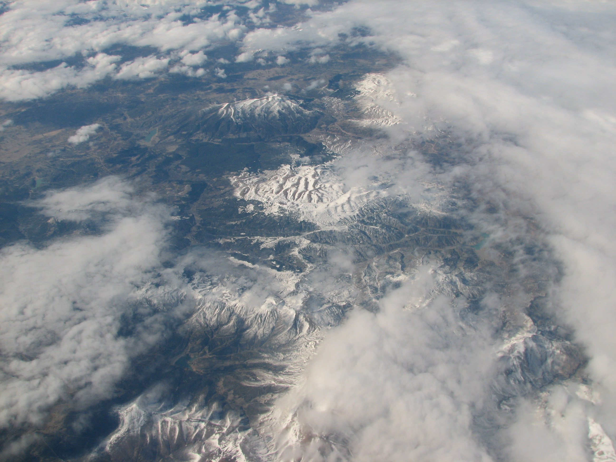 Ukraińskie Karpaty